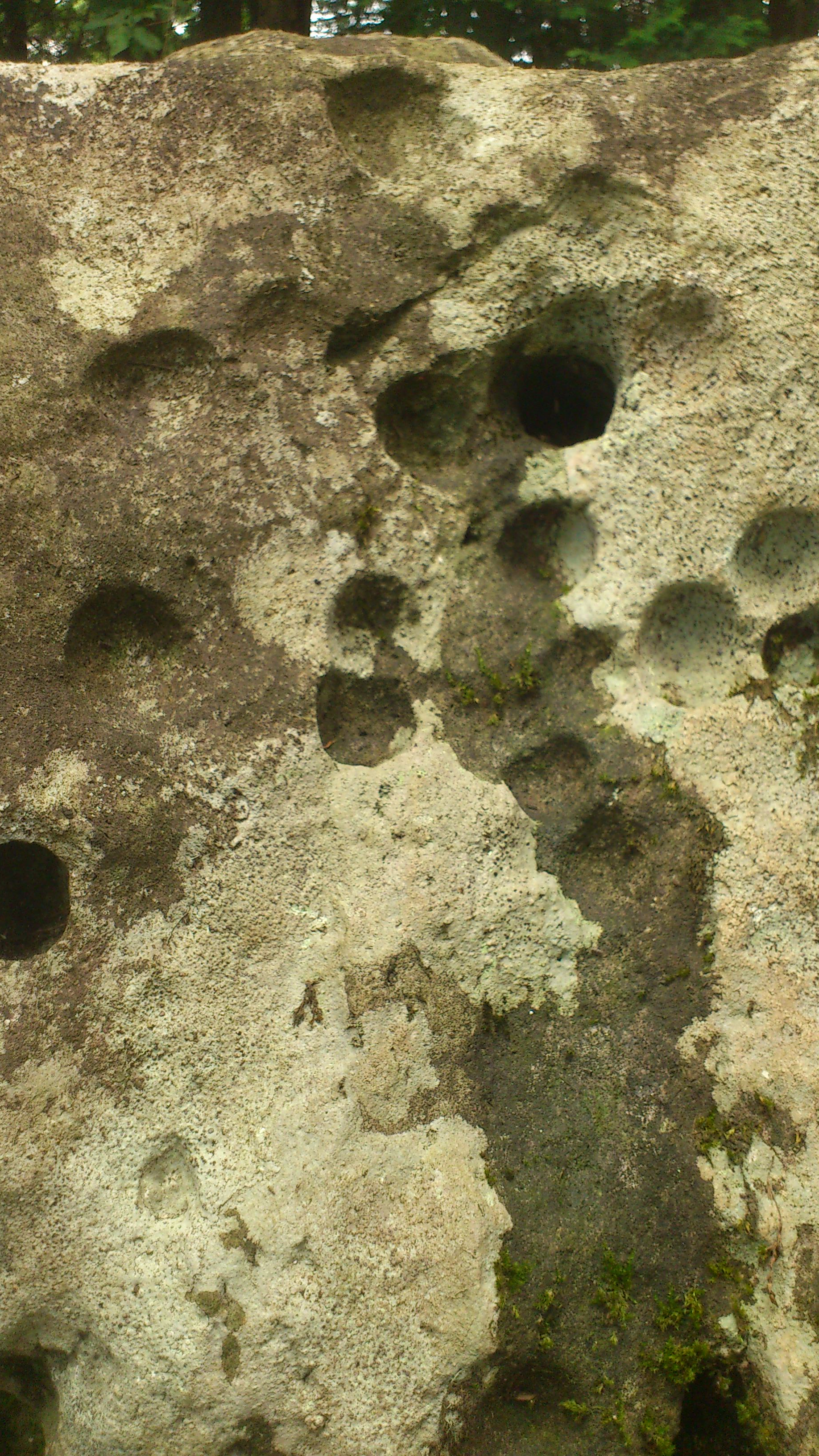 伊邪那美命御陵と伝わる比婆山山頂付近に見られる霊石。玉抱石には神気がこもっていると言われ、子供に恵まれない人が石に触れると霊気が授かり、伊邪那美之大神に祈願すると子供に恵まれて安産であると言い伝えられています。石に空いた穴は、そこから玉が飛び出してお腹の中に入り、玉のような元気な赤子になって生まれてくるという伝承があります。